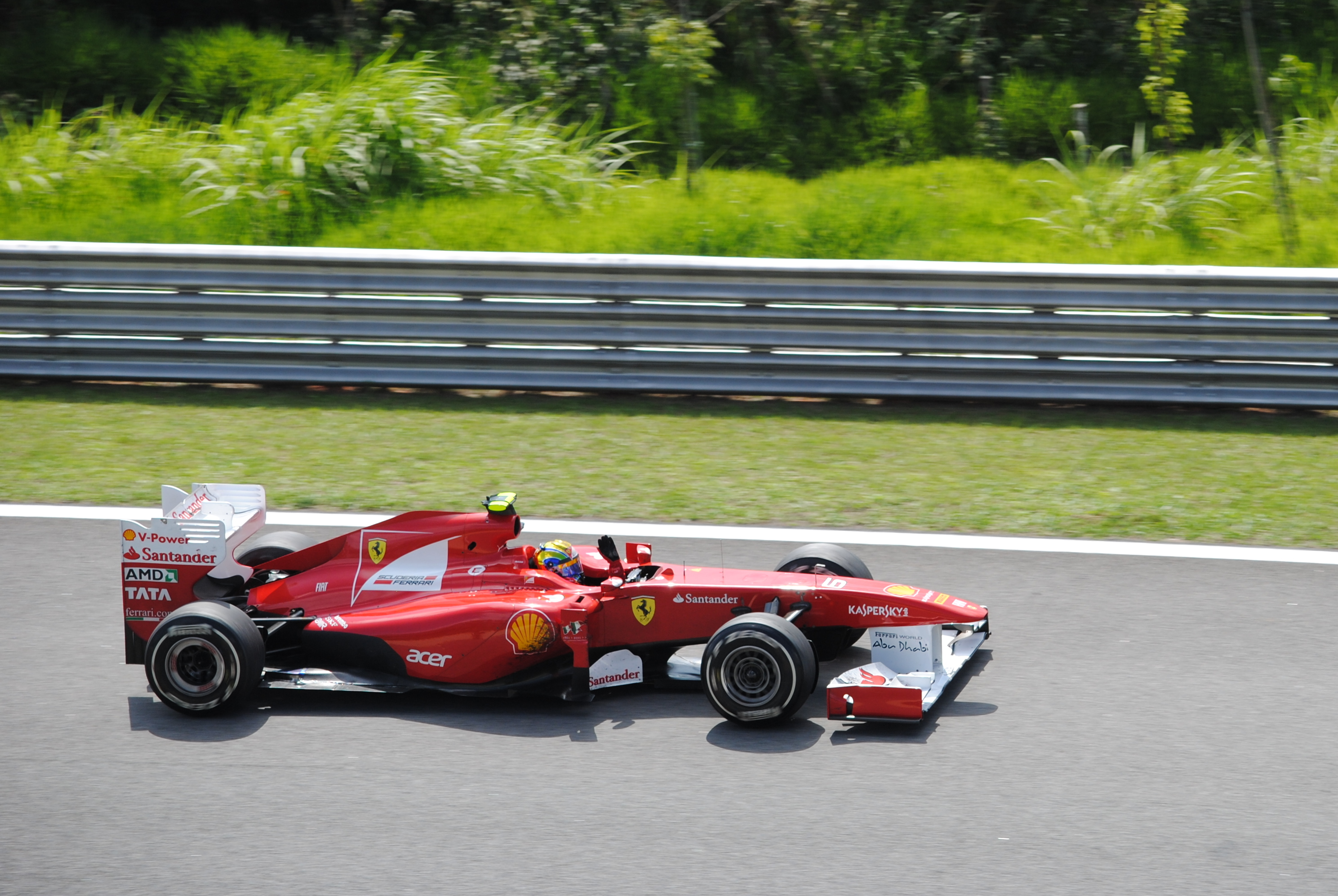 GP Brasil de Formula 1 - Interlagos, São Paulo.